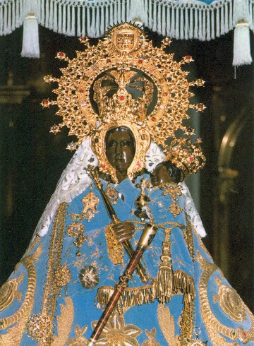 Nuestra Señora de las Cruces, patrona de Daimiel